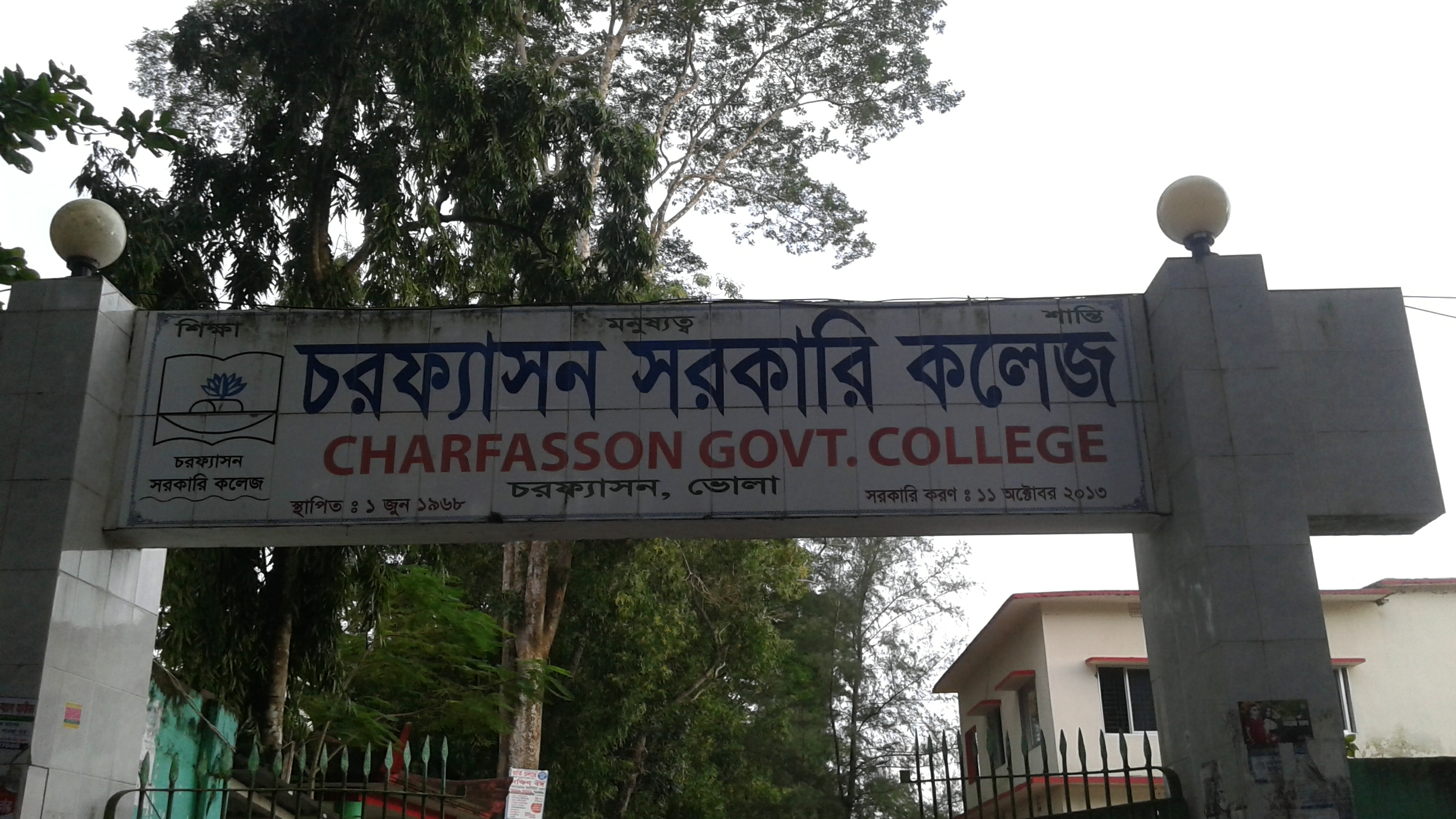 চরফ্যাসন সরকারি কলেজ, মেইন গেইট।